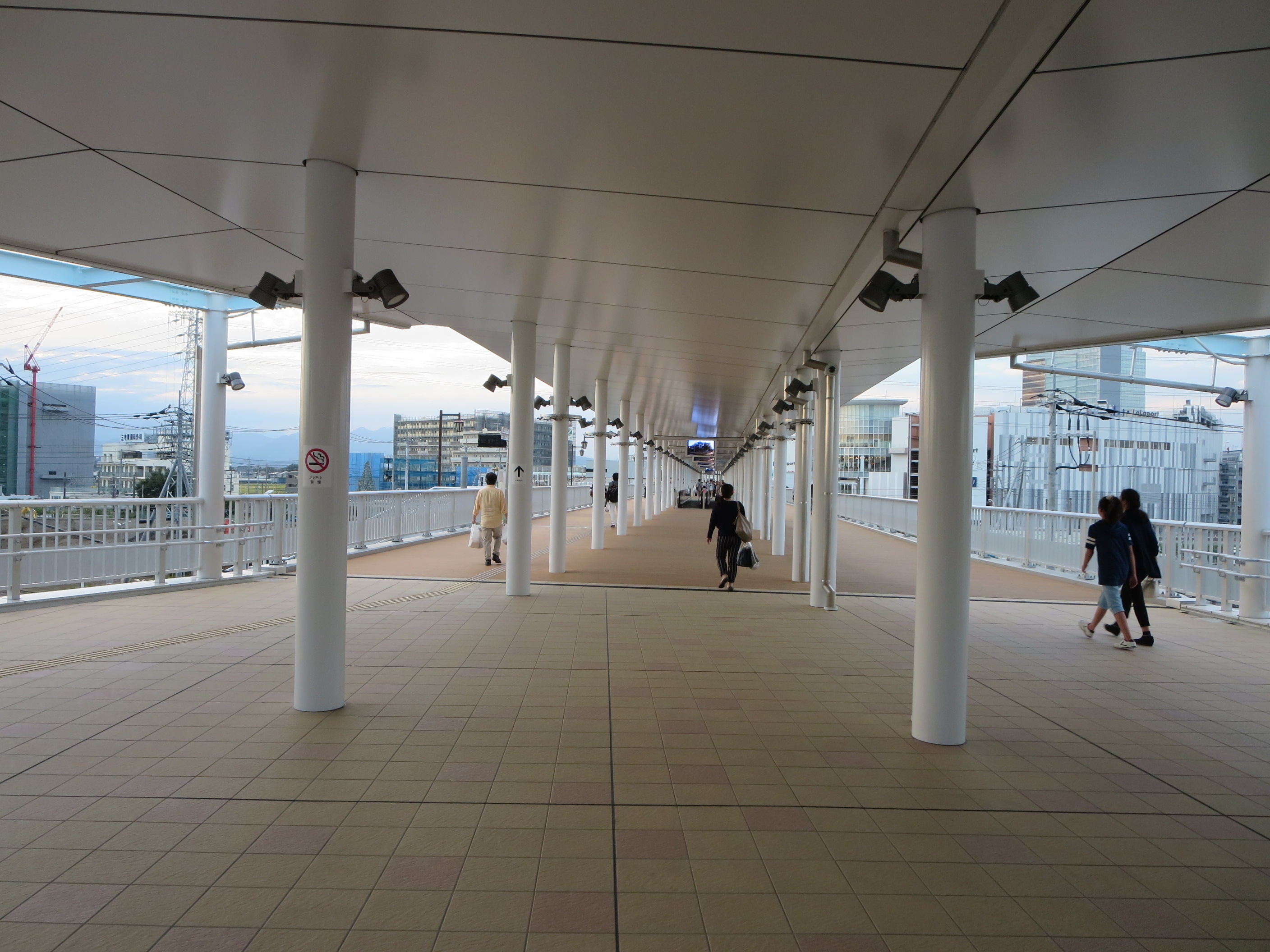 海老名駅西口自由通路